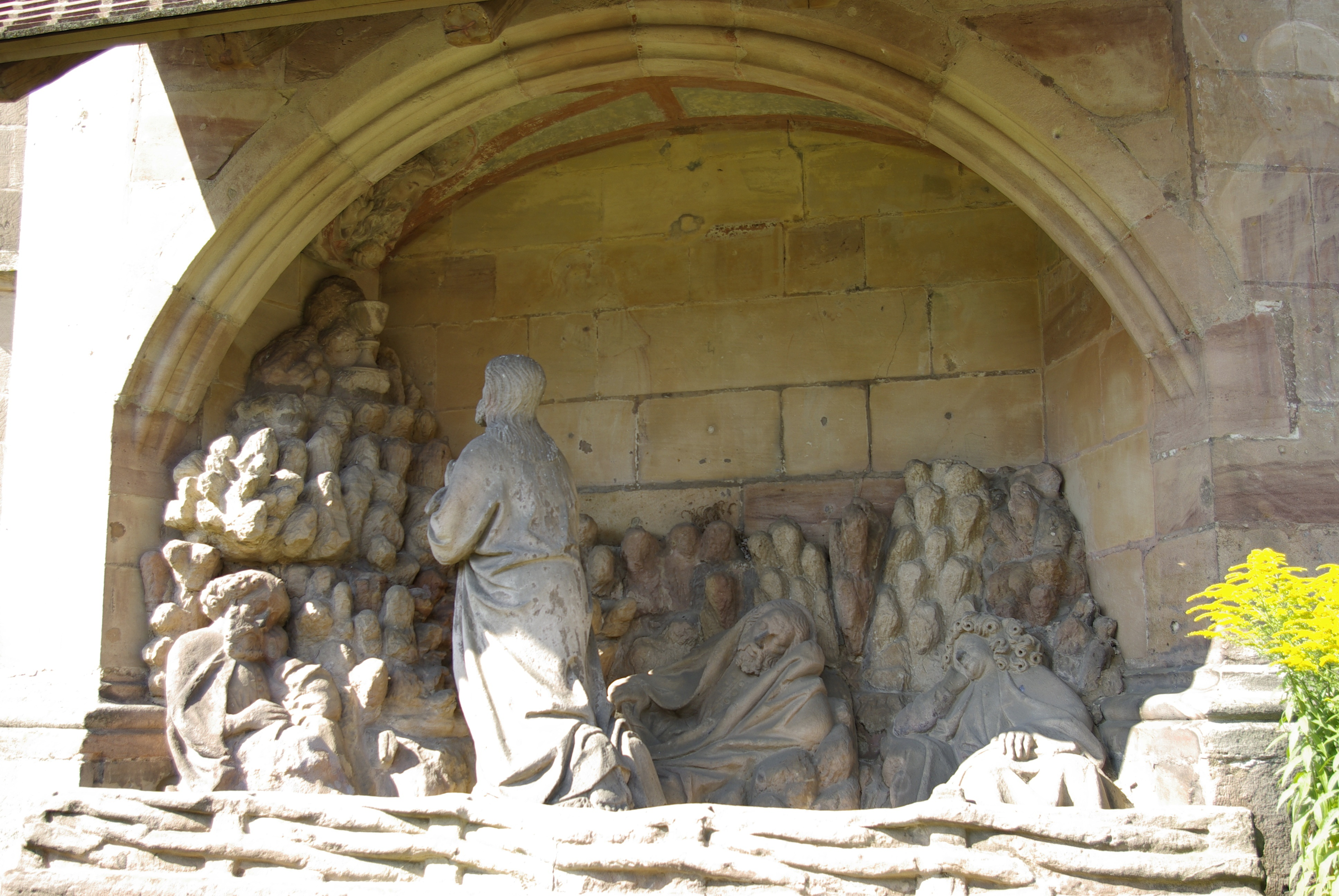 Mittelalterliche Ölberggruppe an der Kirche St. Laurentius in Roßtal